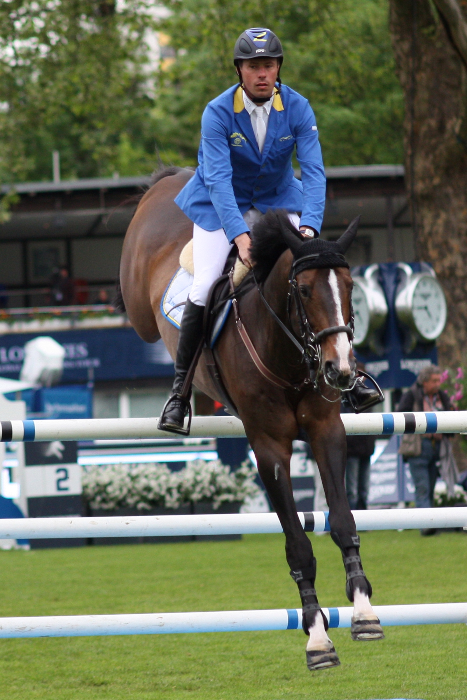 77. Internationanles Wiesbadener Pfingstunier 2013, CSI***** Eröffnungsspringen, Christian Ahlmann auf Taloubet Z Personality rights warning Although this work is freely licensed or in the public domain, the person(s) shown may have rights that legally restrict certain re-uses unless those depicted consent to such uses. In these cases, a model release or other evidence of consent could protect you from infringement claims.